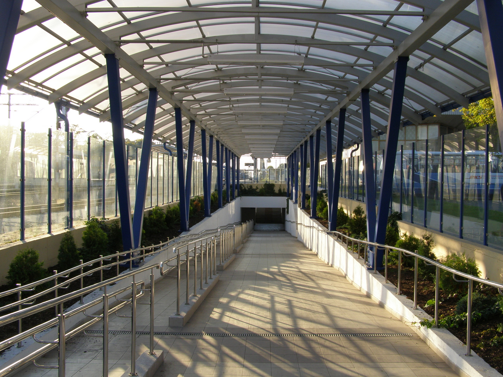 Mińsk Mazowiecki Train Station / Mińsk Mazowiecki (stacja kolejowa)